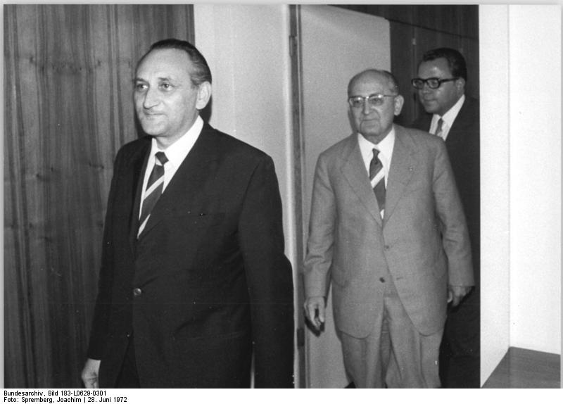 ADN-Bildarchiv-Spremberg 28.6.1972 Berlin: Minister Winzer empfing Staatssekretär Bahr- Der Minister für Auswärtige Angelegenheit der DDR, Otto Winzer (2.v.l.), empfing am 28.6.72 den Staatssekretär im Bundeskanzleramt der BRD, Egon Bahr (l.), zu einem Gespräch über Fragen in Zusammenhang mit dem Meinungsaustausch zwischen der DDR und der BRD. Die Unterredung, an der der Staatssekretär beim Ministerrat der DDR, Dr. Michael Kohl (r) teilnahm, kam auf beiderseitigem Wunsch zustande.